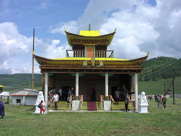 дацан